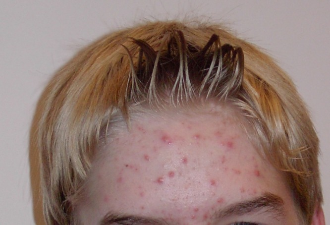 Akné – papulózní forma